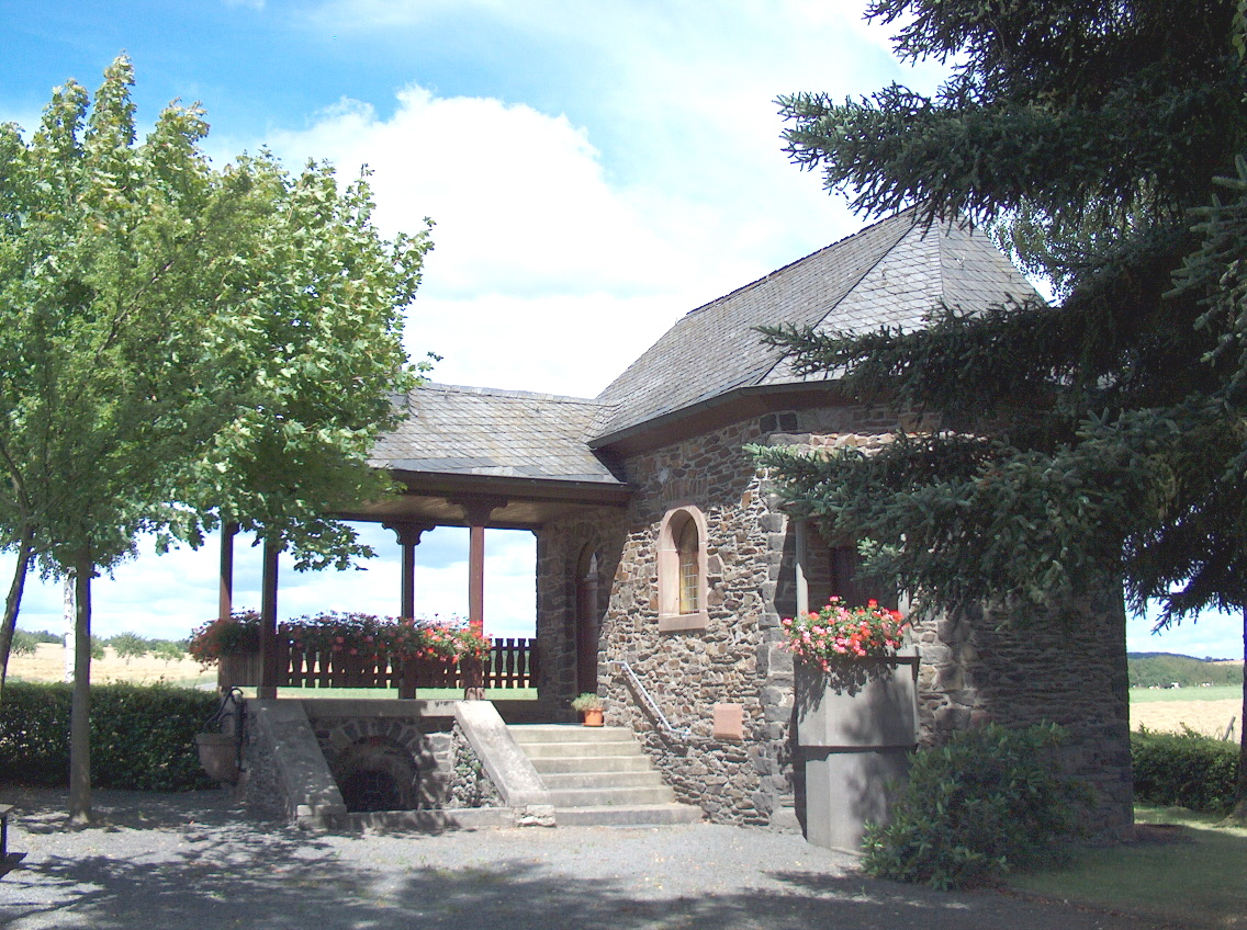 Edeltrudiskapelle Niedeöfflingen